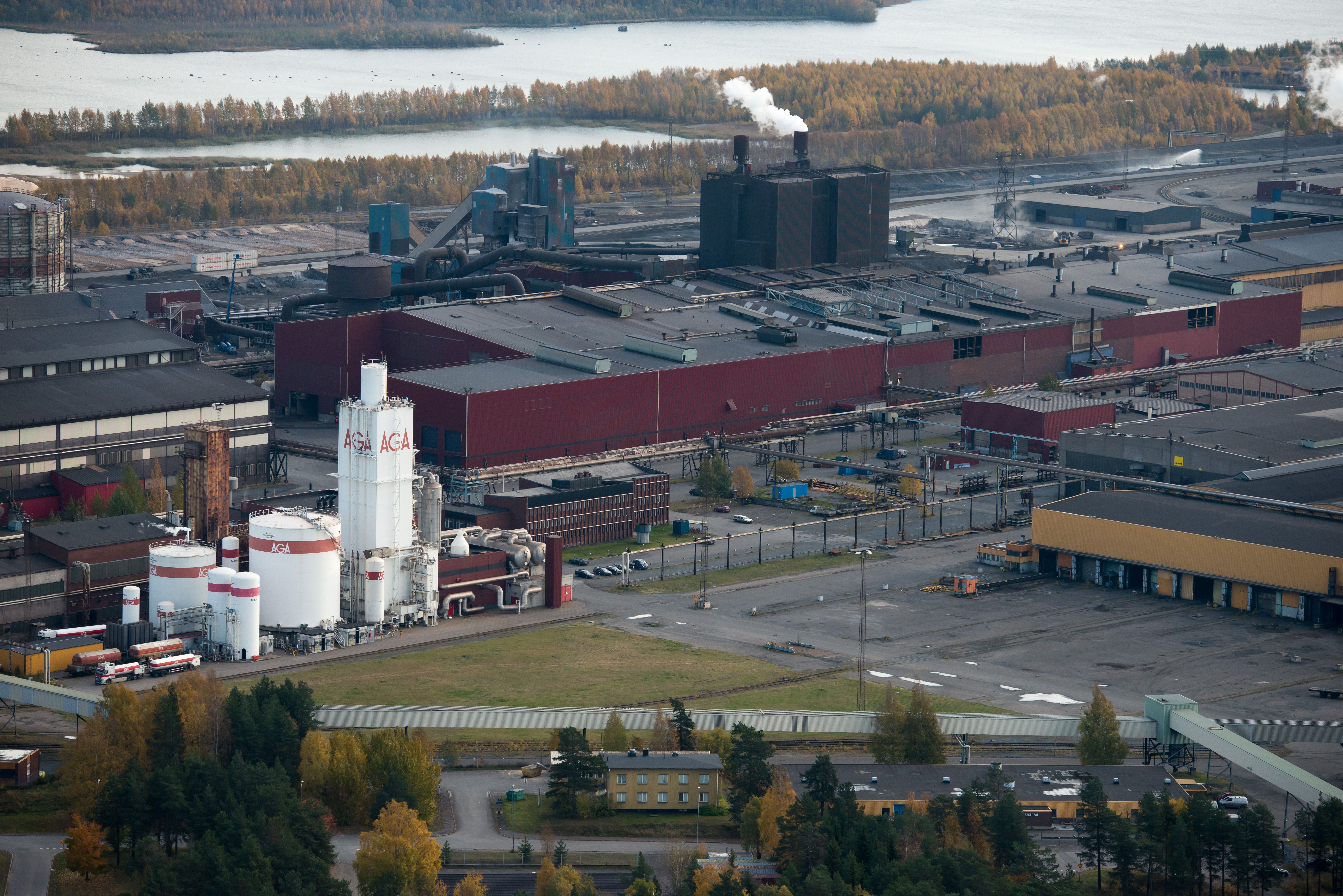 Stålverket vid SSAB.